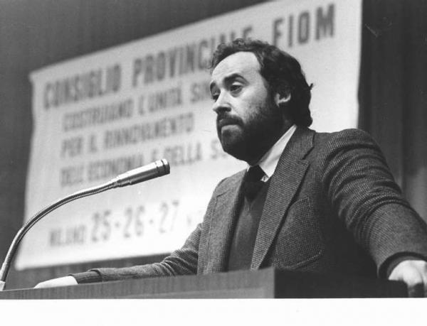 Ottaviano Del Turco al microfono